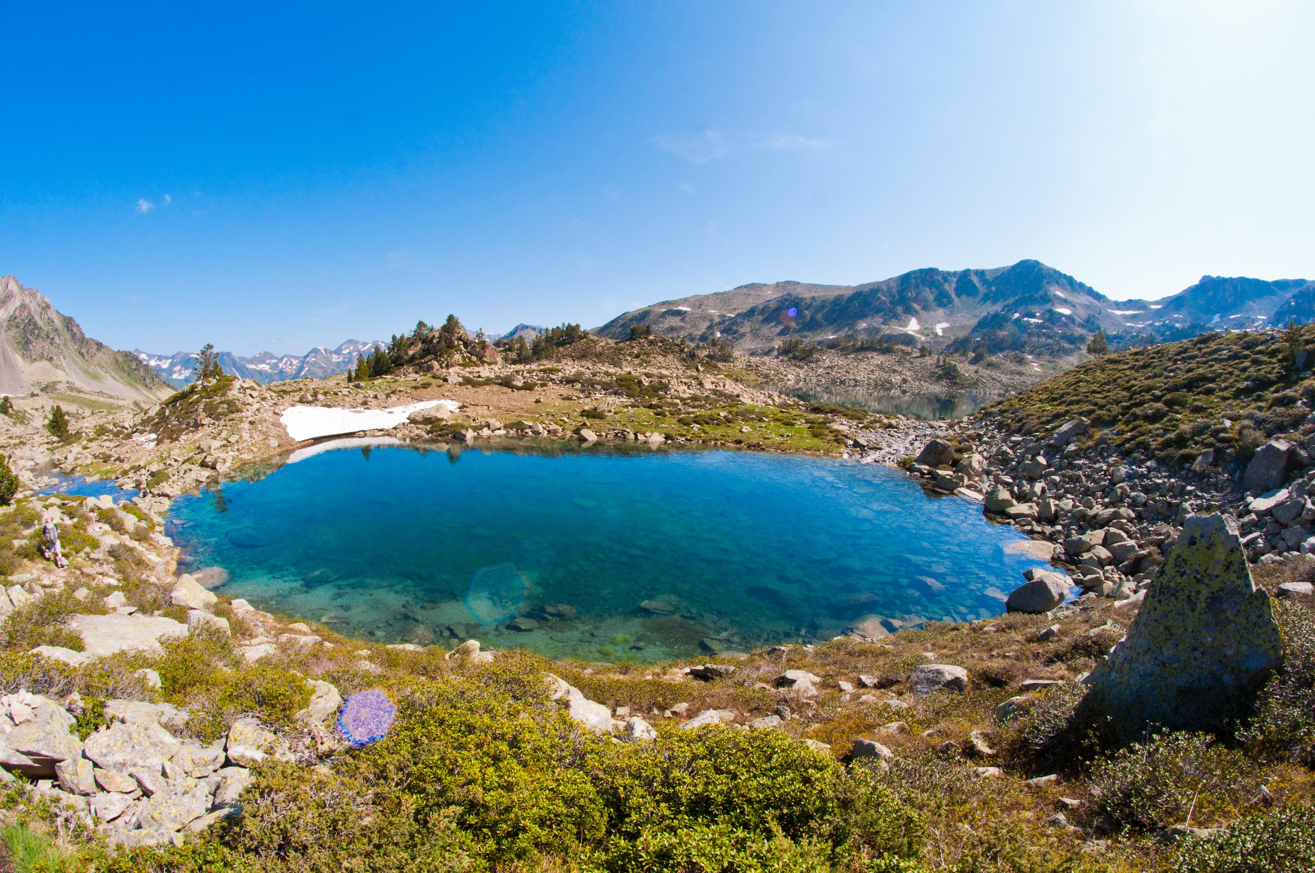 Lac de Mounicot - Réserve naturelle nationale du Néouvielle